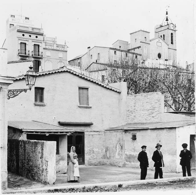 Mercat i església a Masnou. Josep Salvany i Blanch (1912)